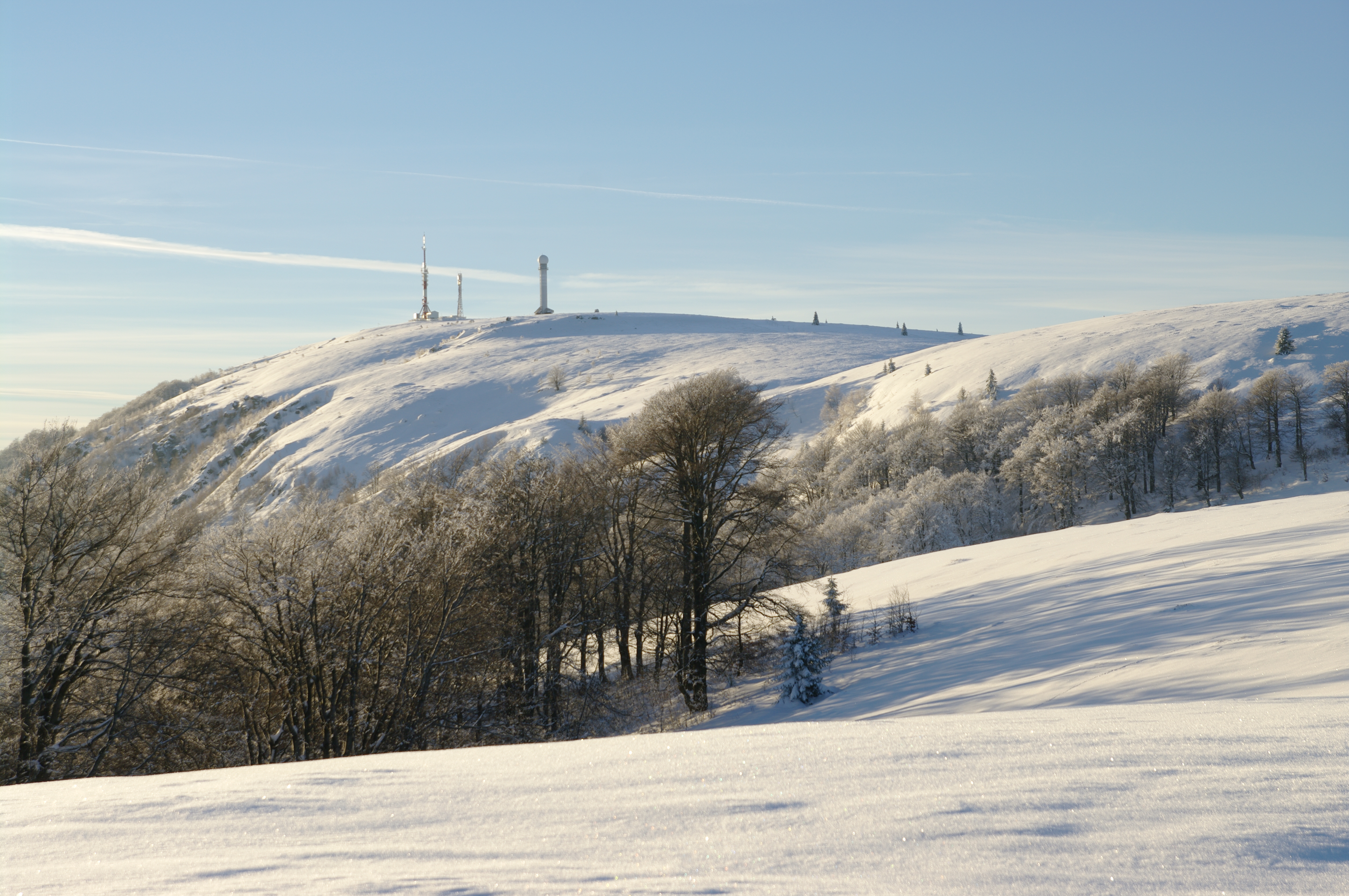 Vârful Igniș, văzut de pe drumul forestier care vine de la stațiunea Izvoare